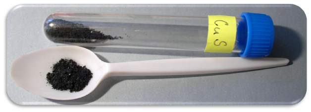 Sulfid měďnatý - CuS